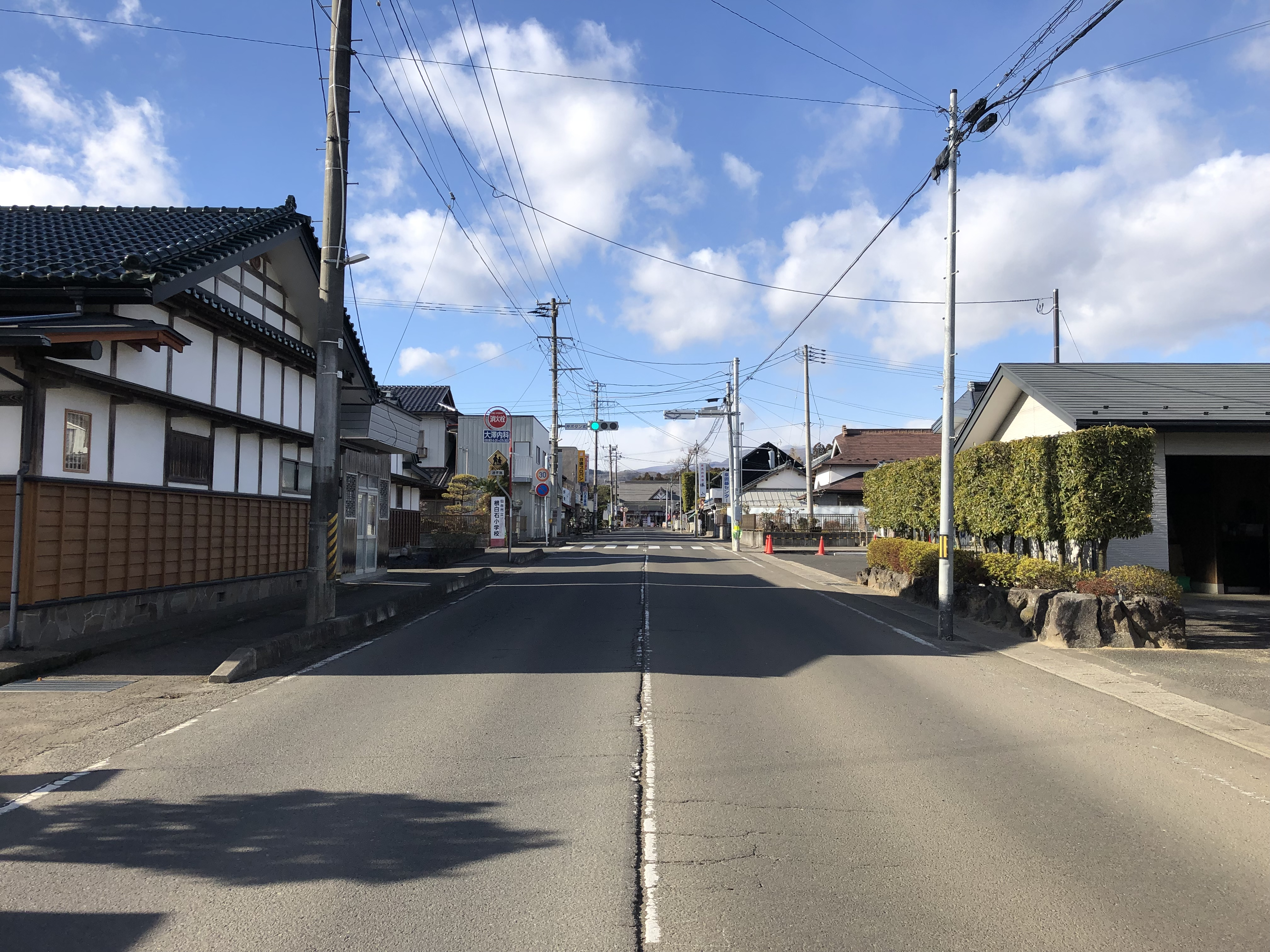 宮城県仙台市泉区 根白石商店街